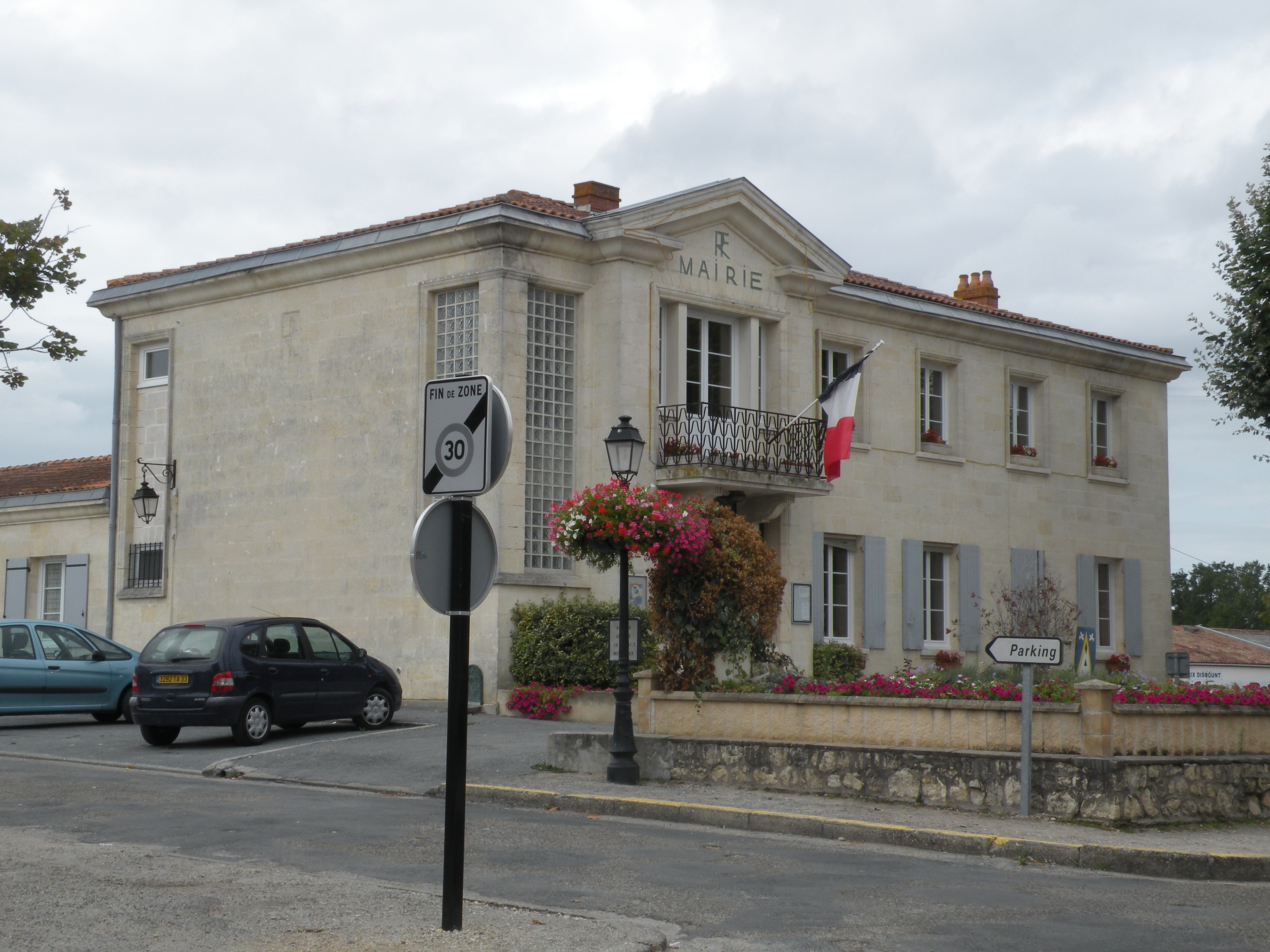 mairie Saint-Vivien-de-Médoc